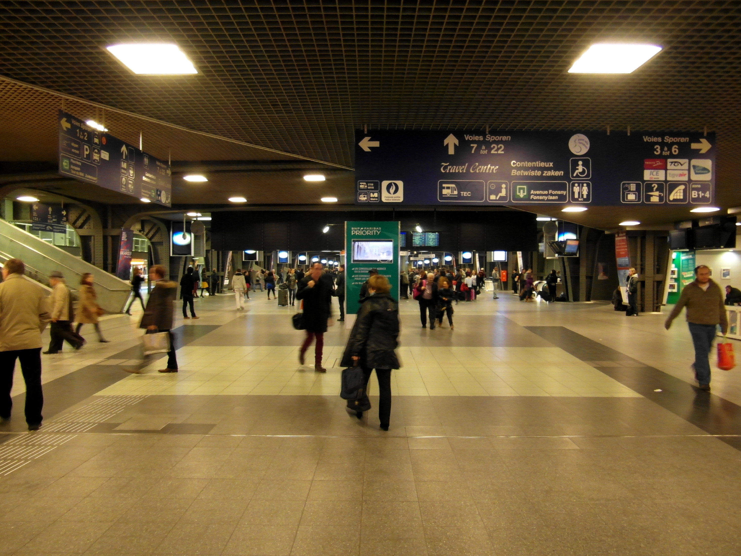 Brüssel Südbahnhof